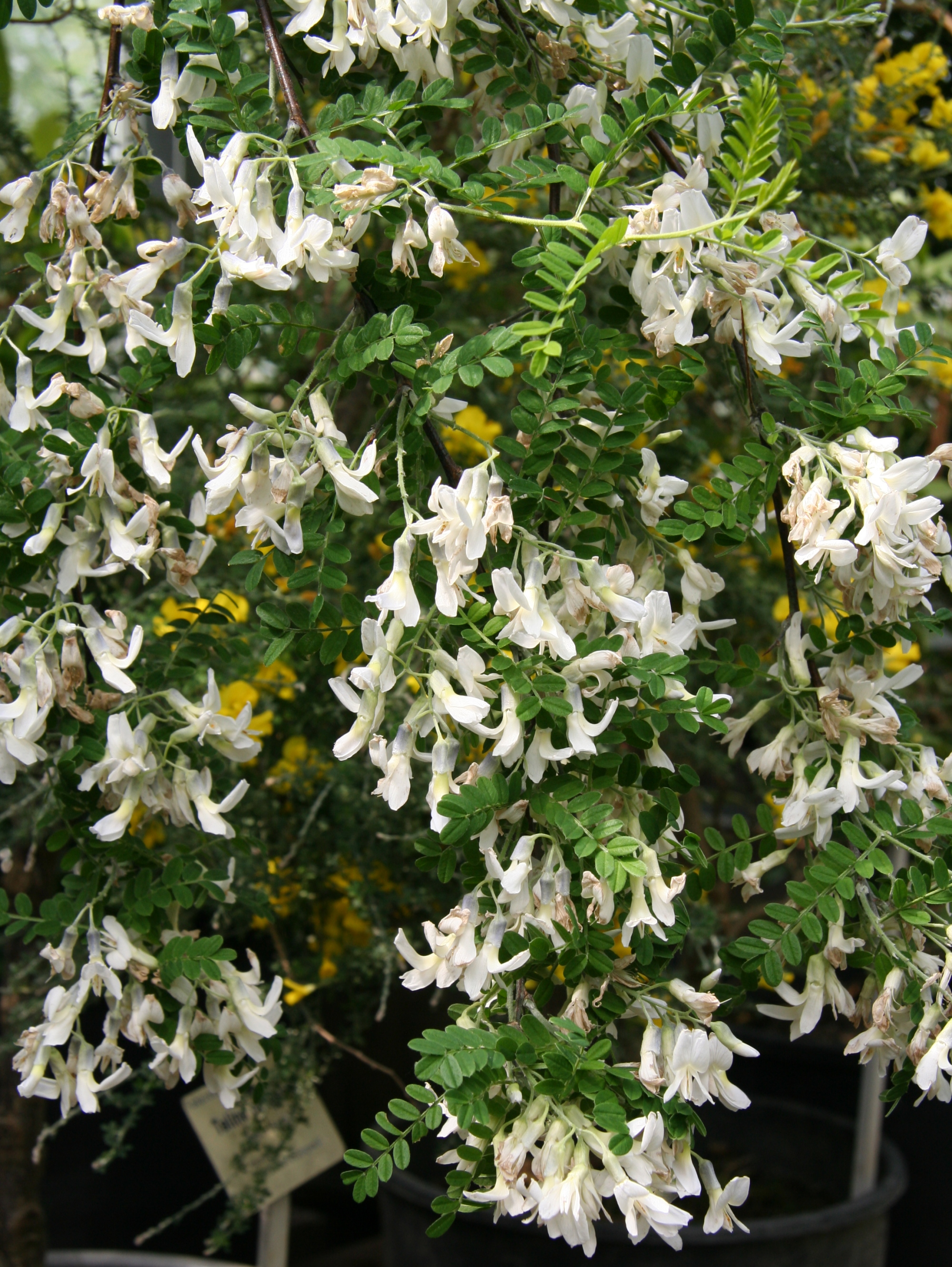 Sophora spp. im Botanischen Garten Dresden - vielleicht Sophora davidii.